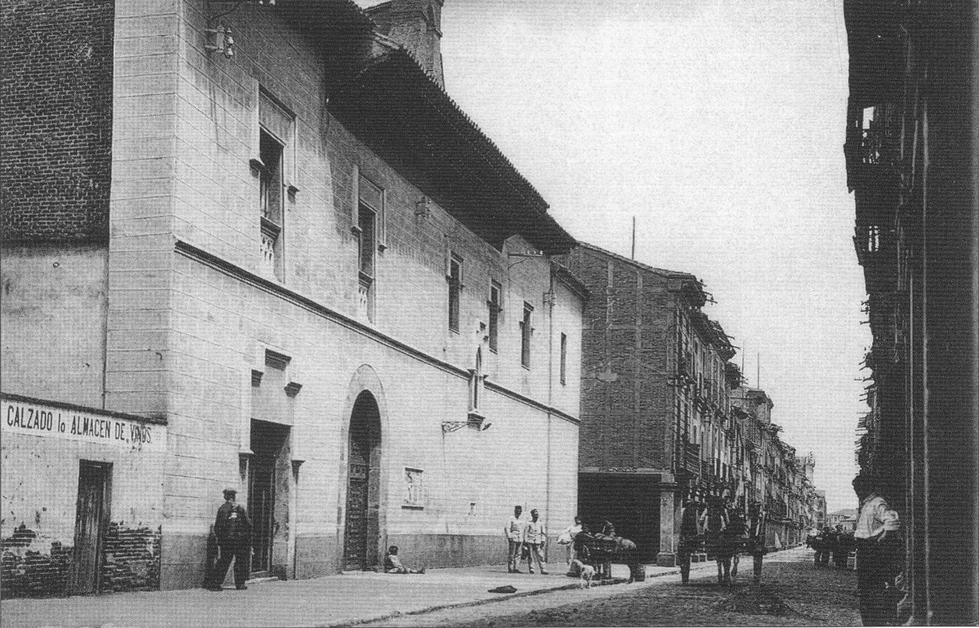 Fachada del Hospital de Antezana y calle Mayor de de Alcalá de Henares (Comunidad de Madrid - España). Tarjeta postal de Hauser y Menet publicada en Madrid hacia 1910, en cartulina blanca y negra de 9 x 14 cm. Texto en el anverso: "H. M. - M. / ALCALÁ DE HENARES: CALLE MAYOR y HOSPITAL DE ANTEZANA".